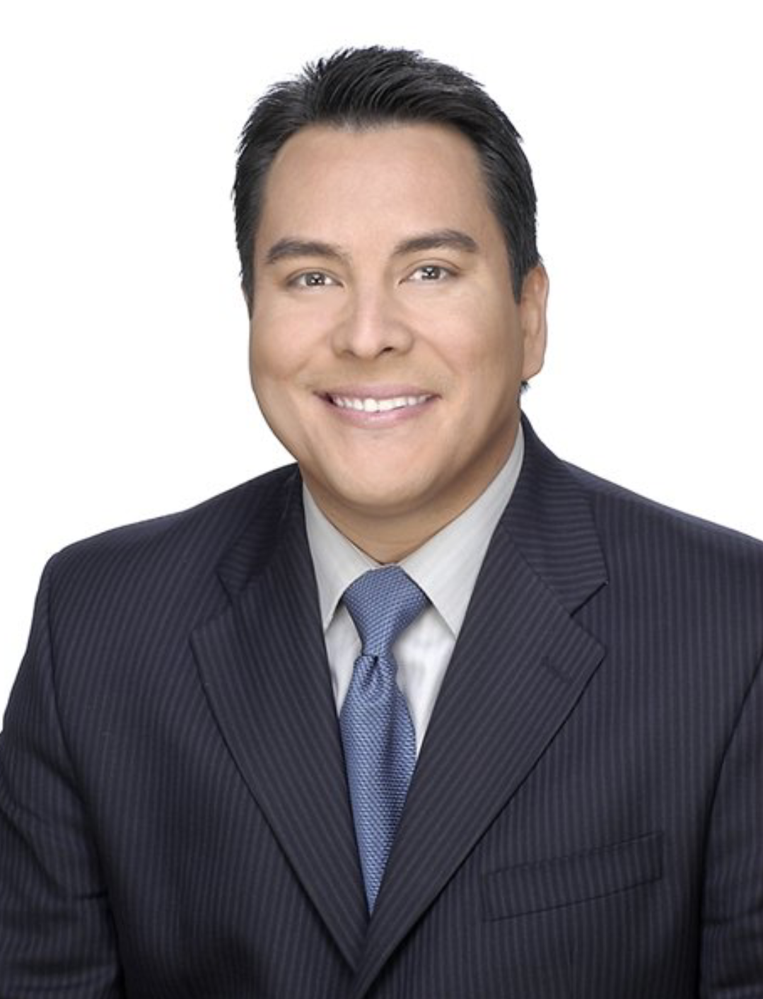 Sportscaster Adrian Garcia Marquez